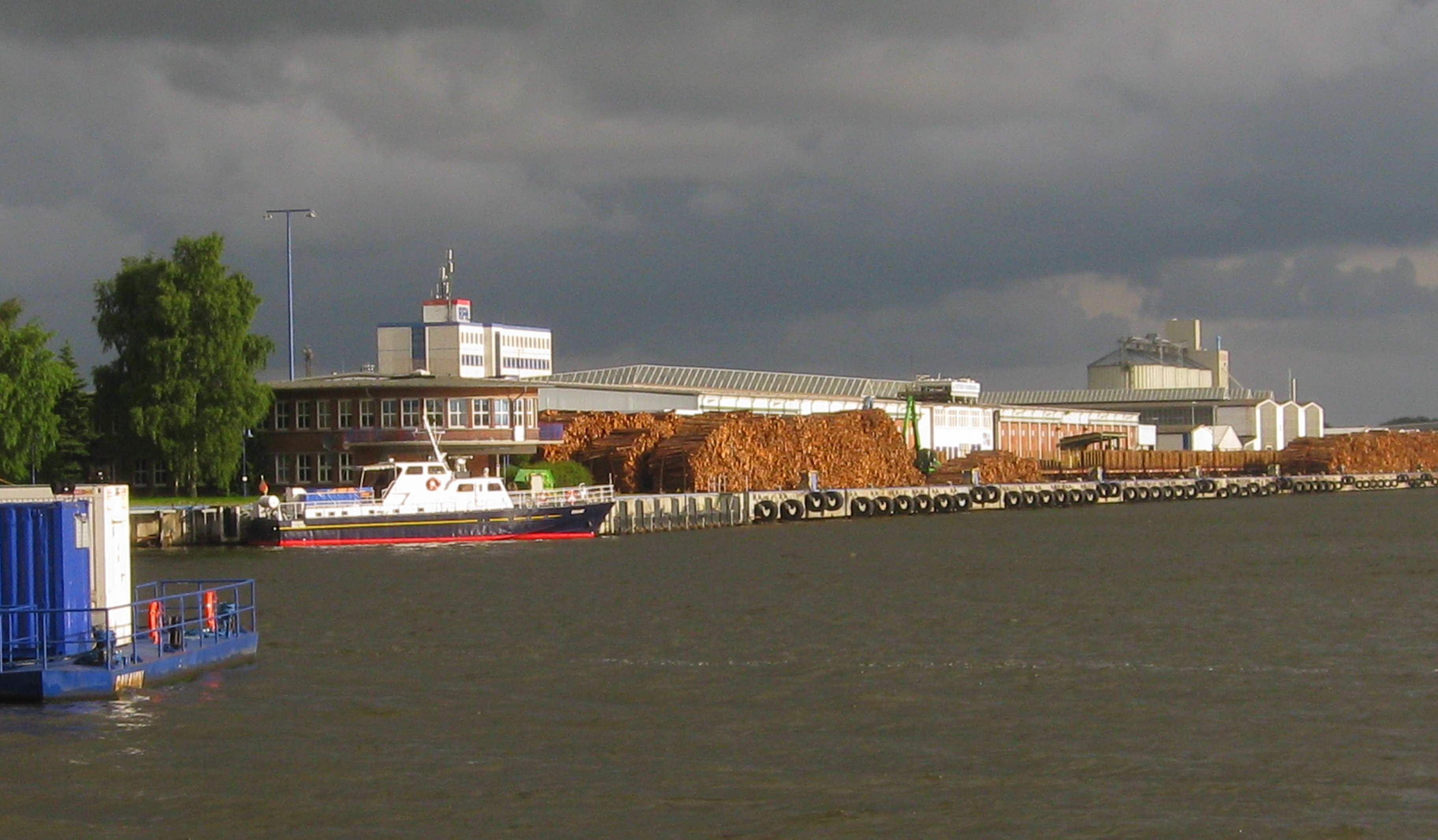 Holzhafen in Rostock.